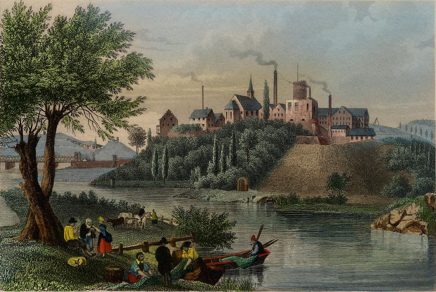 Wetter an der Ruhr (Burg Wetter, alte Freiheit Wetter, mechanische Werkstätten, Harkort'scher Industriebetrieb), Stahlstich von Carl Mayers Kunstanstalt in Nürnberg nach einer Zeichnung von Carl Schlickum (1808–1869)